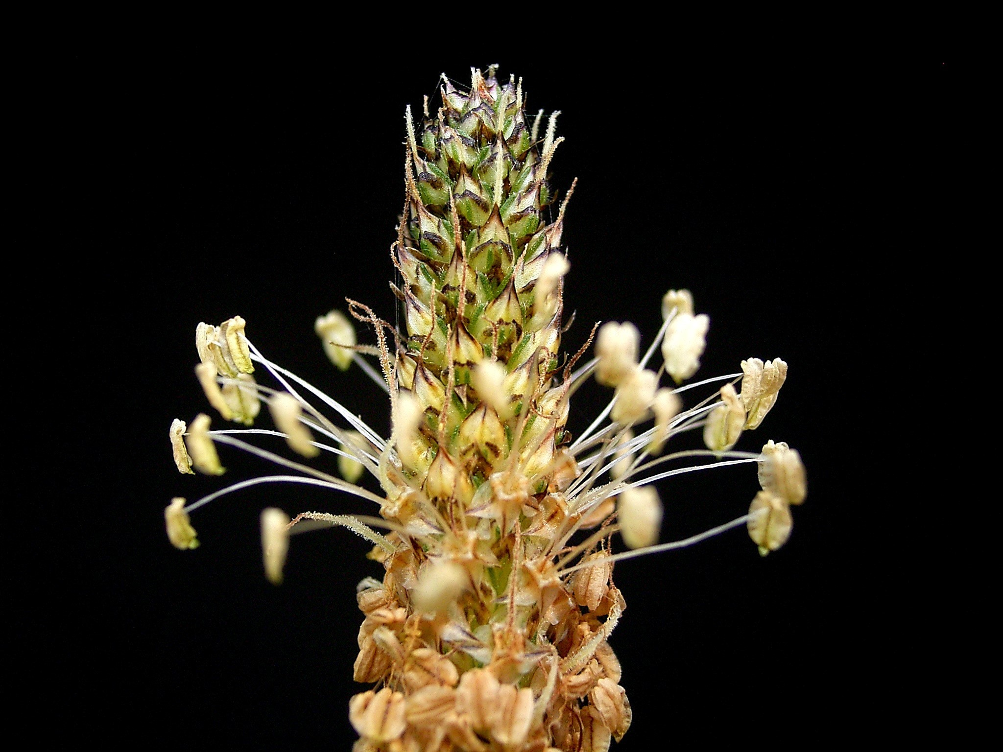 Plantago lanceolata